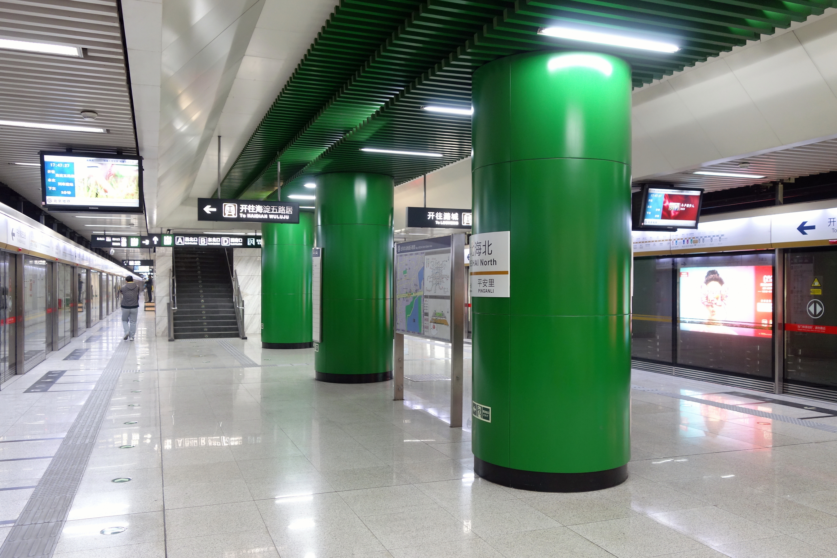 北京地铁6号线北海北站岛式站台